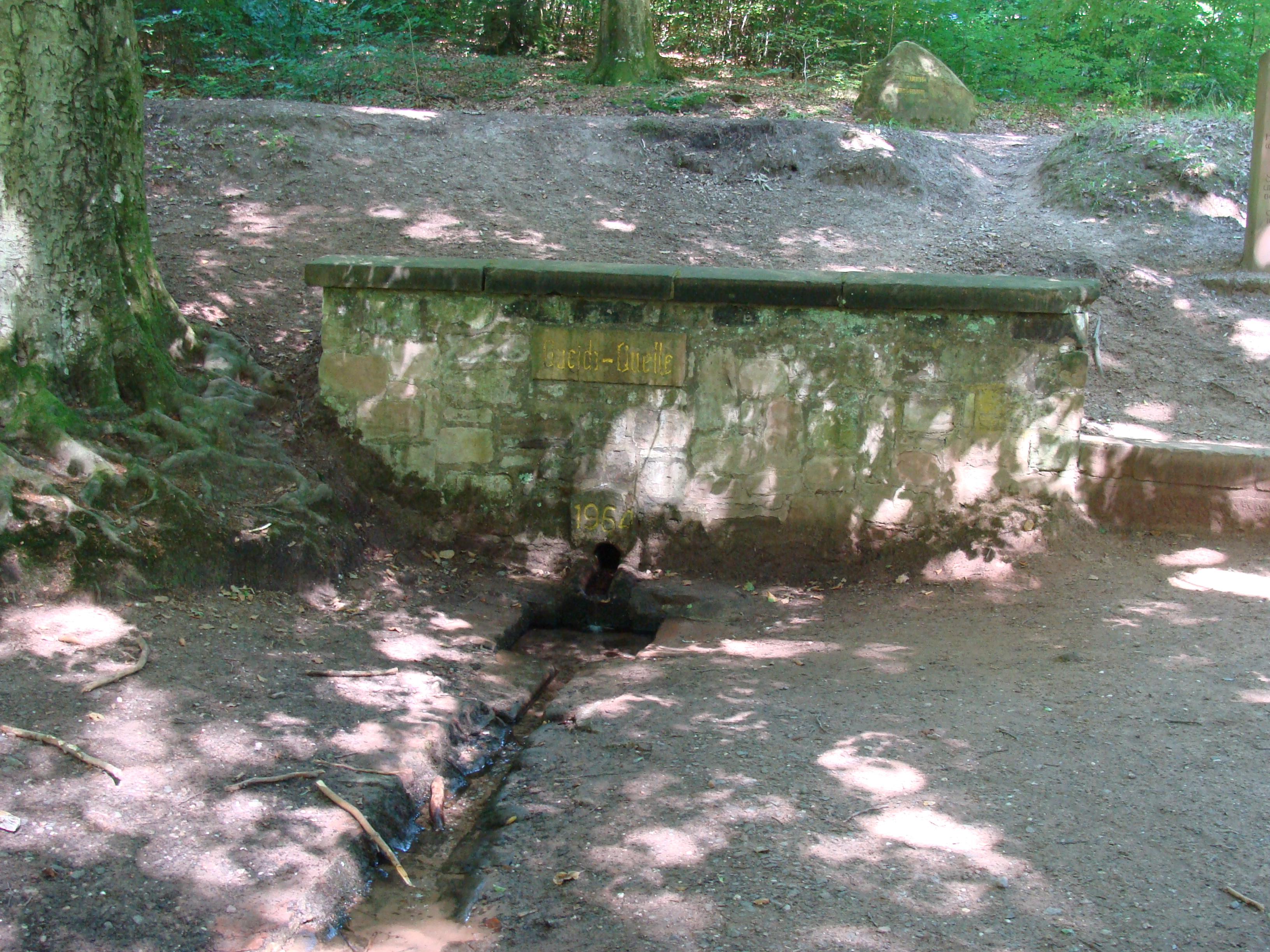 Queichquelle bei Hauenstein im Wasgau/Pfälzerwald